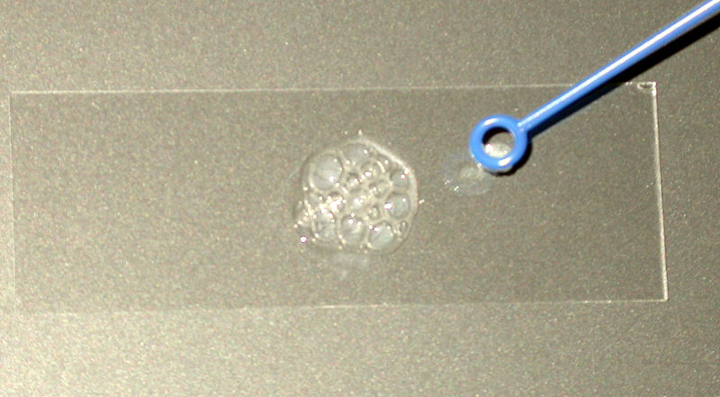 Image from French wikipedia. In creative commons licese Here are the details about the license of the image: Les droits de l'image ci-dessus sont régis par une licence Creative Commons, et plus précisément par la licence Paternité – Partage des conditions initiales à l'identique France v. 2.0 de Creative Commons, plus connue sous le nom de « CC-BY-SA-2.0 FR ».